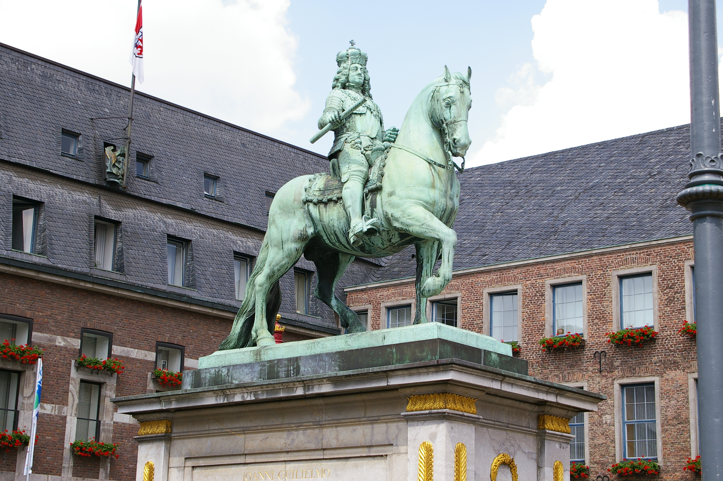 Jan Wellem Reiterstandbild in Düsseldorf, von Gabriel de Grupello Genehmigung: GFDL (Version 1.2, November 2002), kein wie auch immer geartetes "Gentlemen-Agreement". Bildnutzung ohne Einhaltung der Bestimmungen der GFDL ist kostenpflichtig und wird vom Rechteinhaber in Rechnung gestellt. Zweitlizensierung ggf. auch unentgeltlich auf Anfrage. Es gelten die AGB.